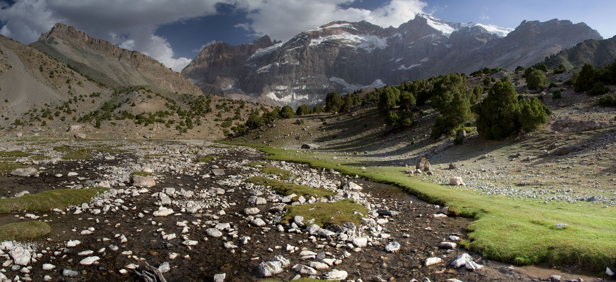 Долина Куликалонских озёр